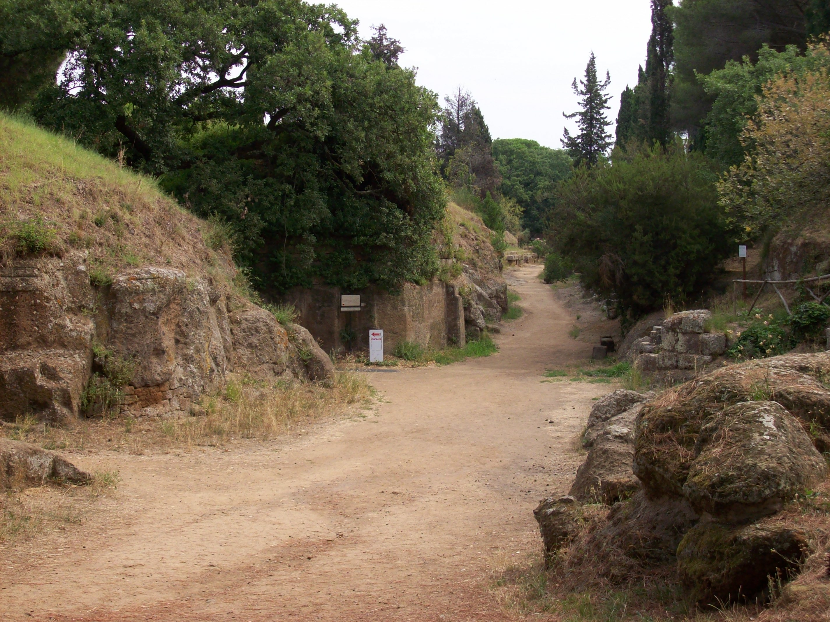 Necropoli della Banditaccia di Cerveteri (ROMA) - MIBAC. Ingresso del complesso This is a photo of a monument which is part of cultural heritage of Italy.